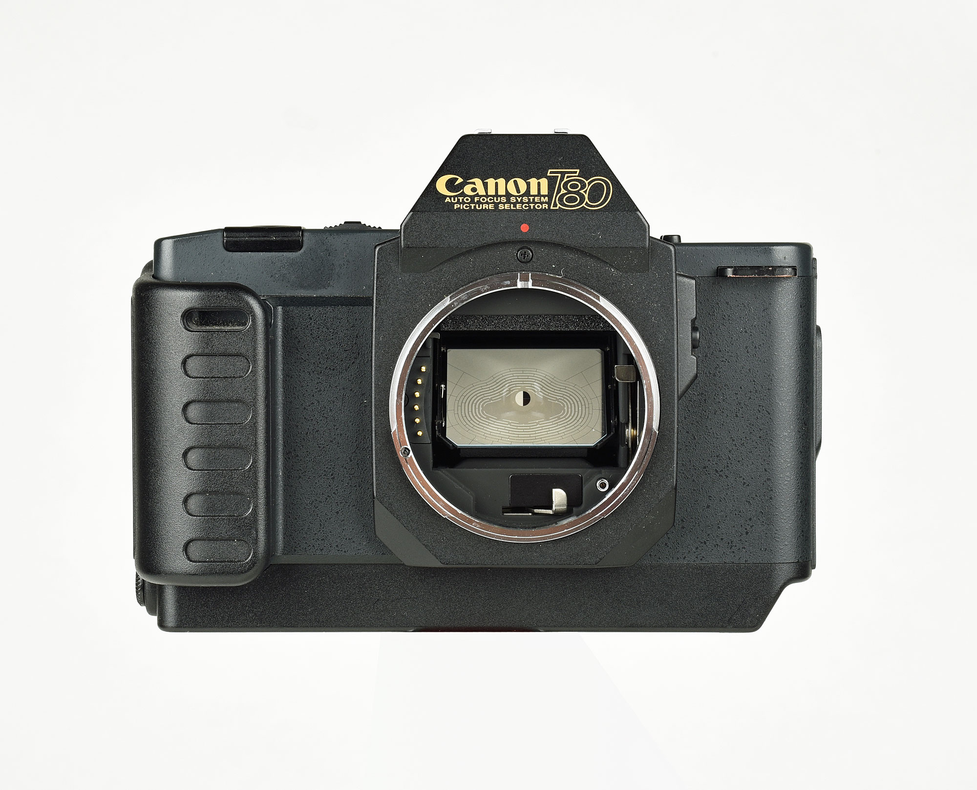 Canon T80 de face avec vue sur la monture AC et ses contacts électriques